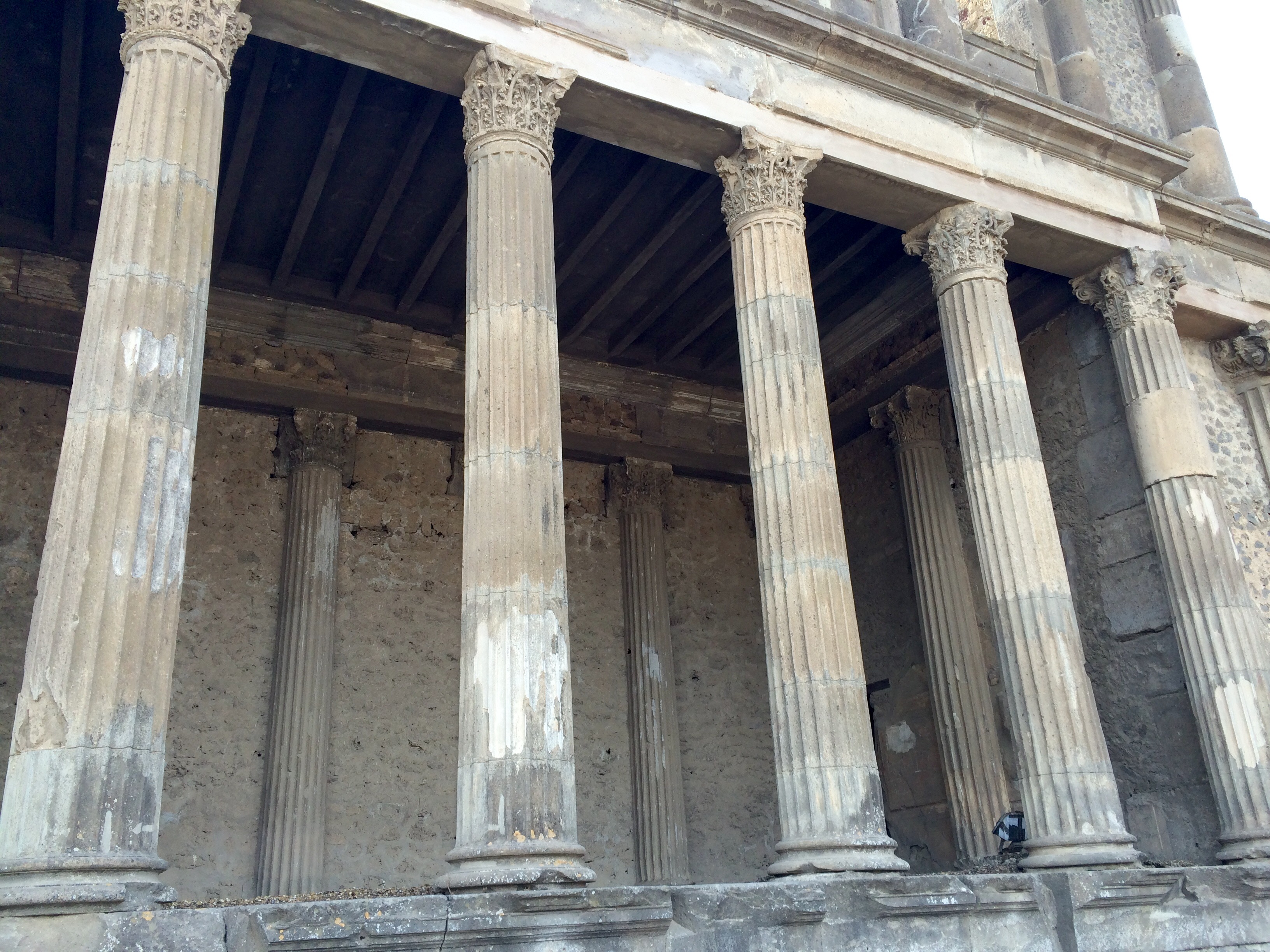 Pompei